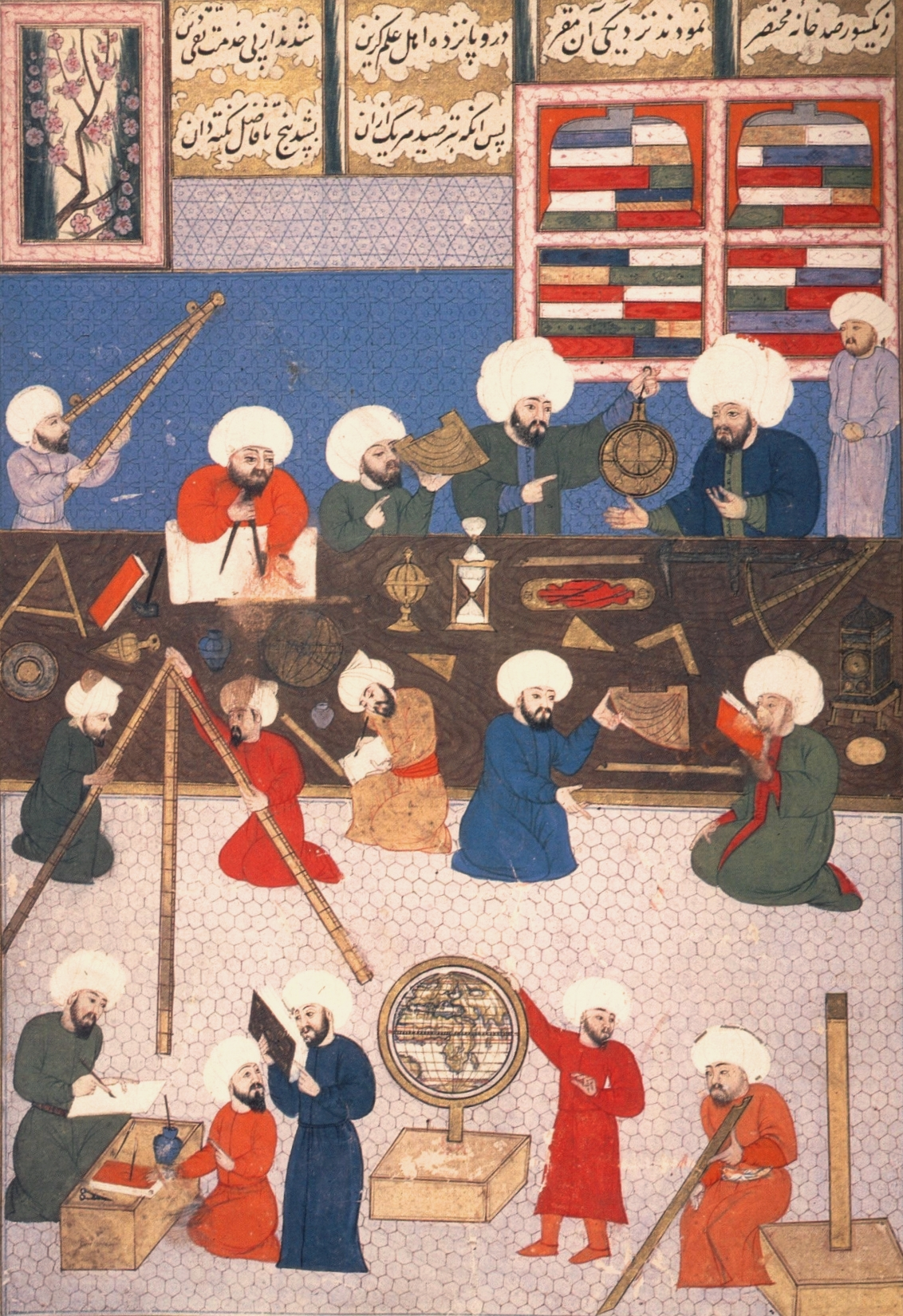 Científicos y pensantes de la Edad Media